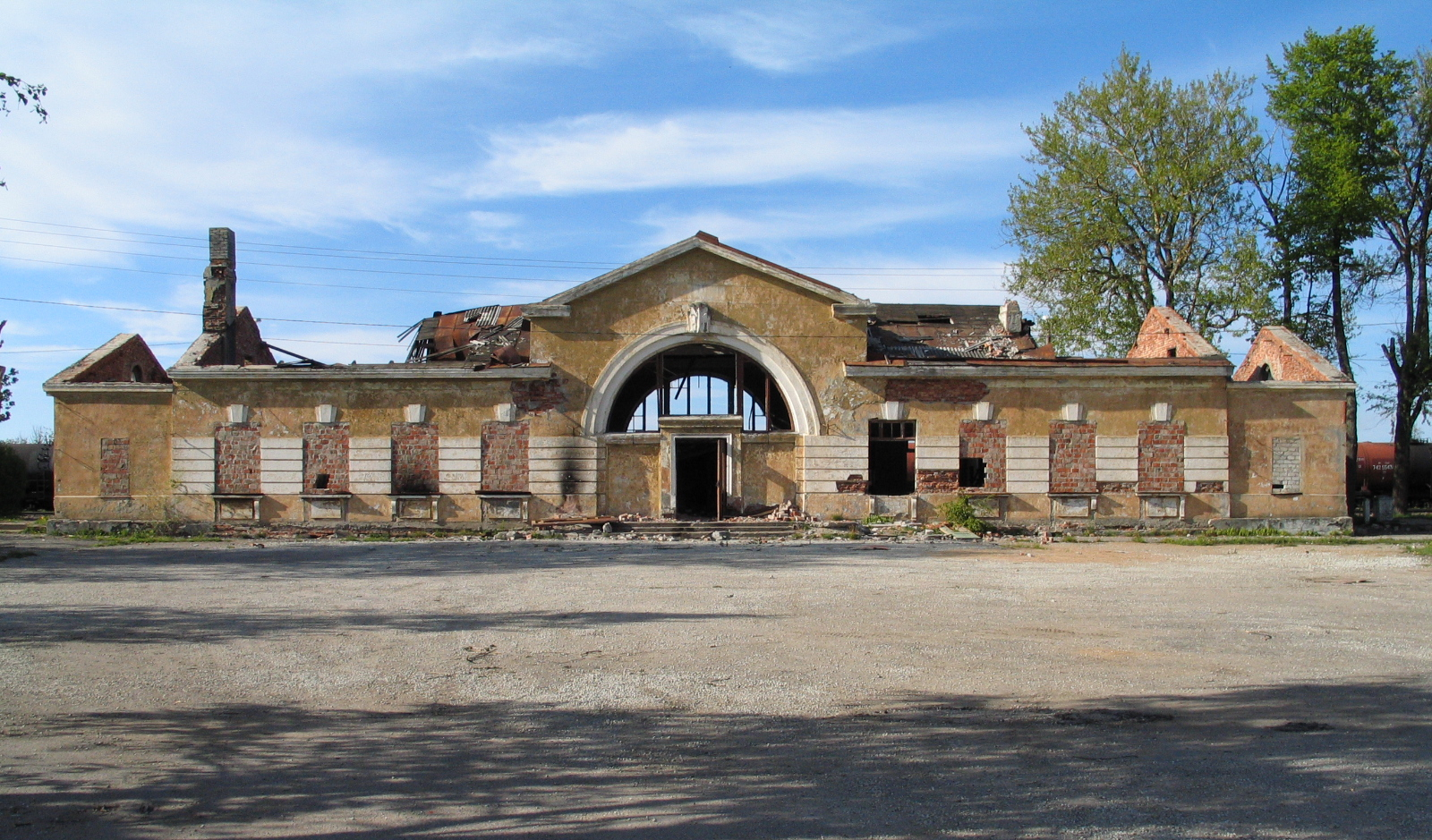 Kohtla-Nõmme varemetes jaamahoone (lammutatud)